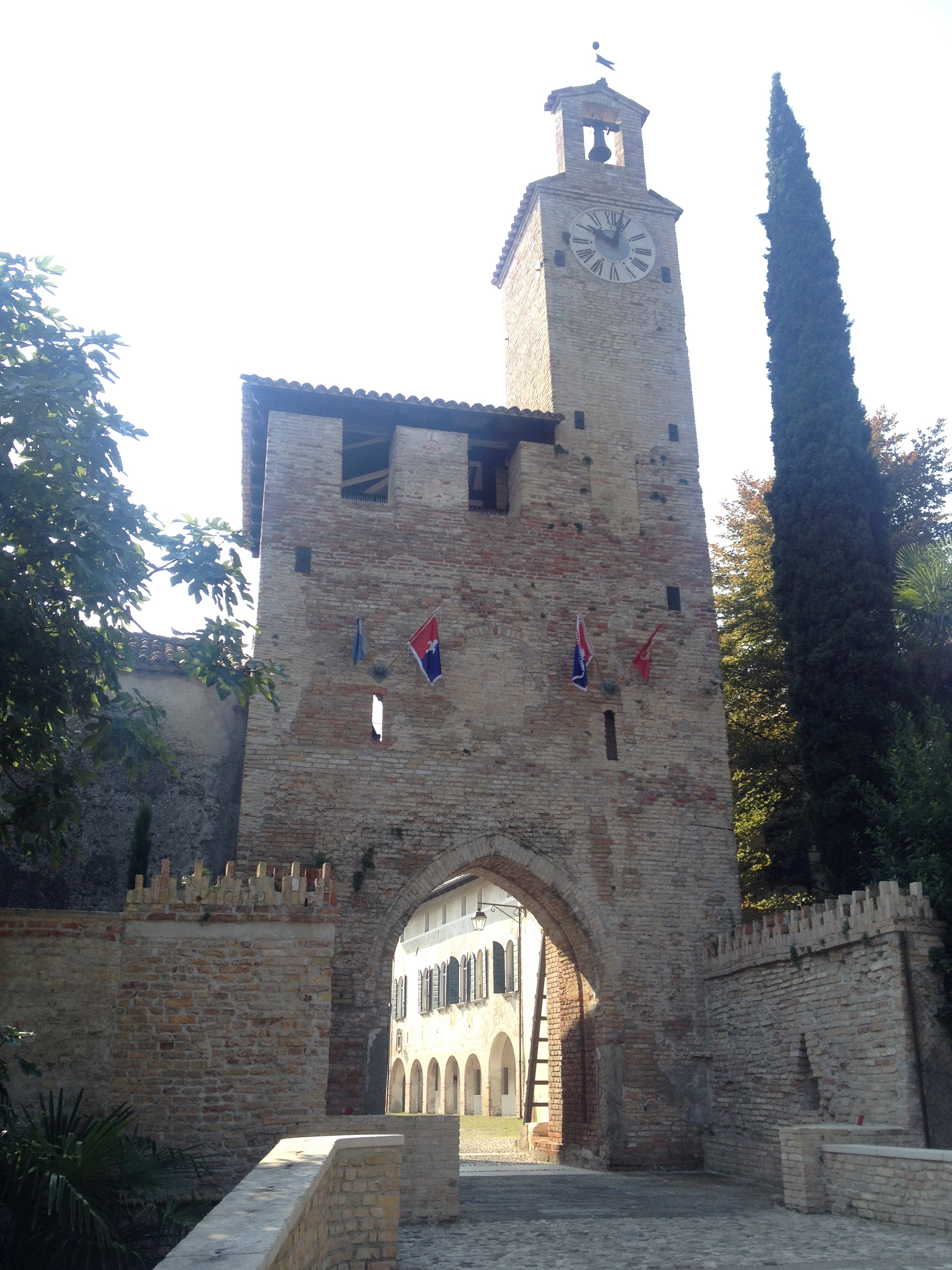 Castello Torre Nord This is a photo of a monument which is part of cultural heritage of Italy.